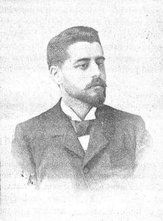 Valentí Marín (chess player)